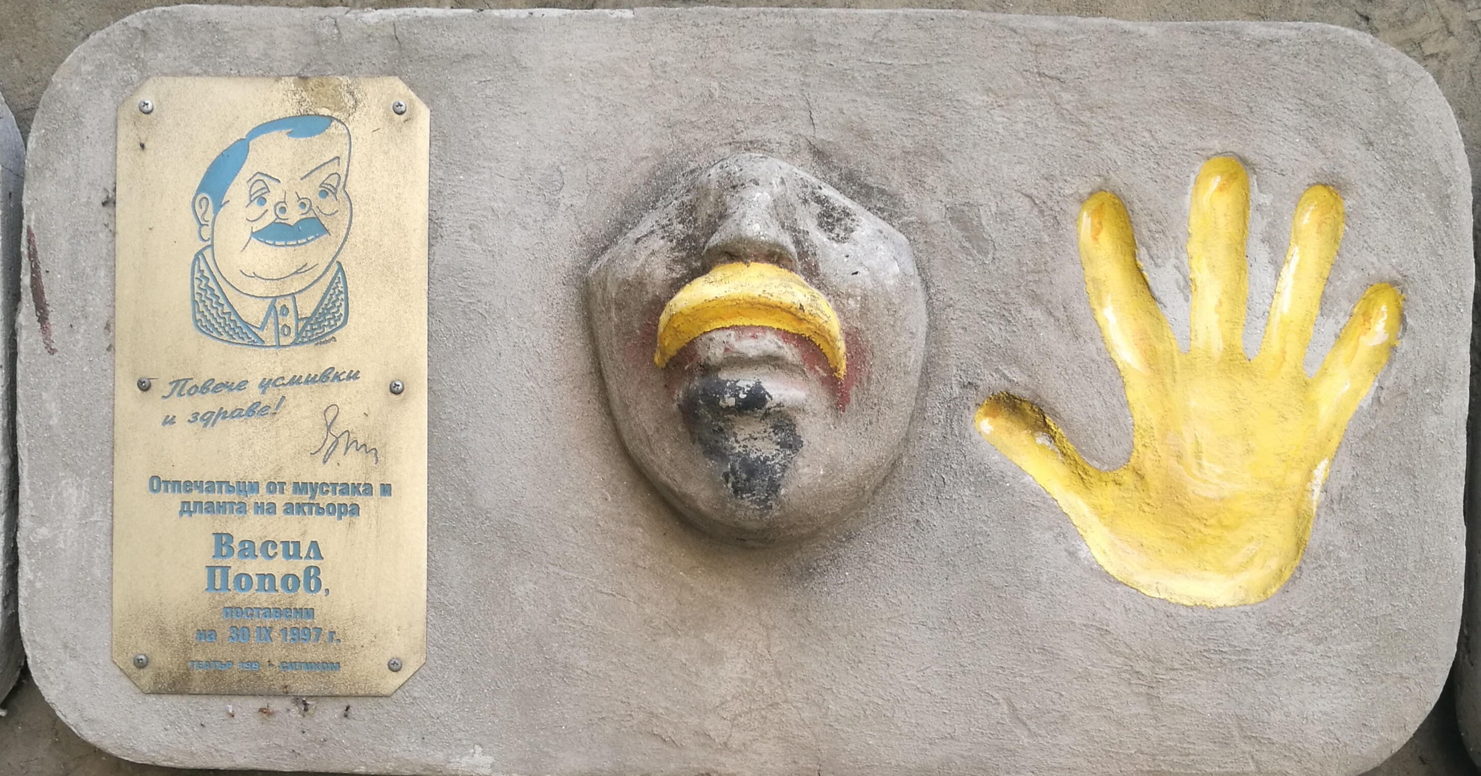 Стената на славата пред Театър 199 - пано с отпечатъци, послание и шарж на Васил Попов.